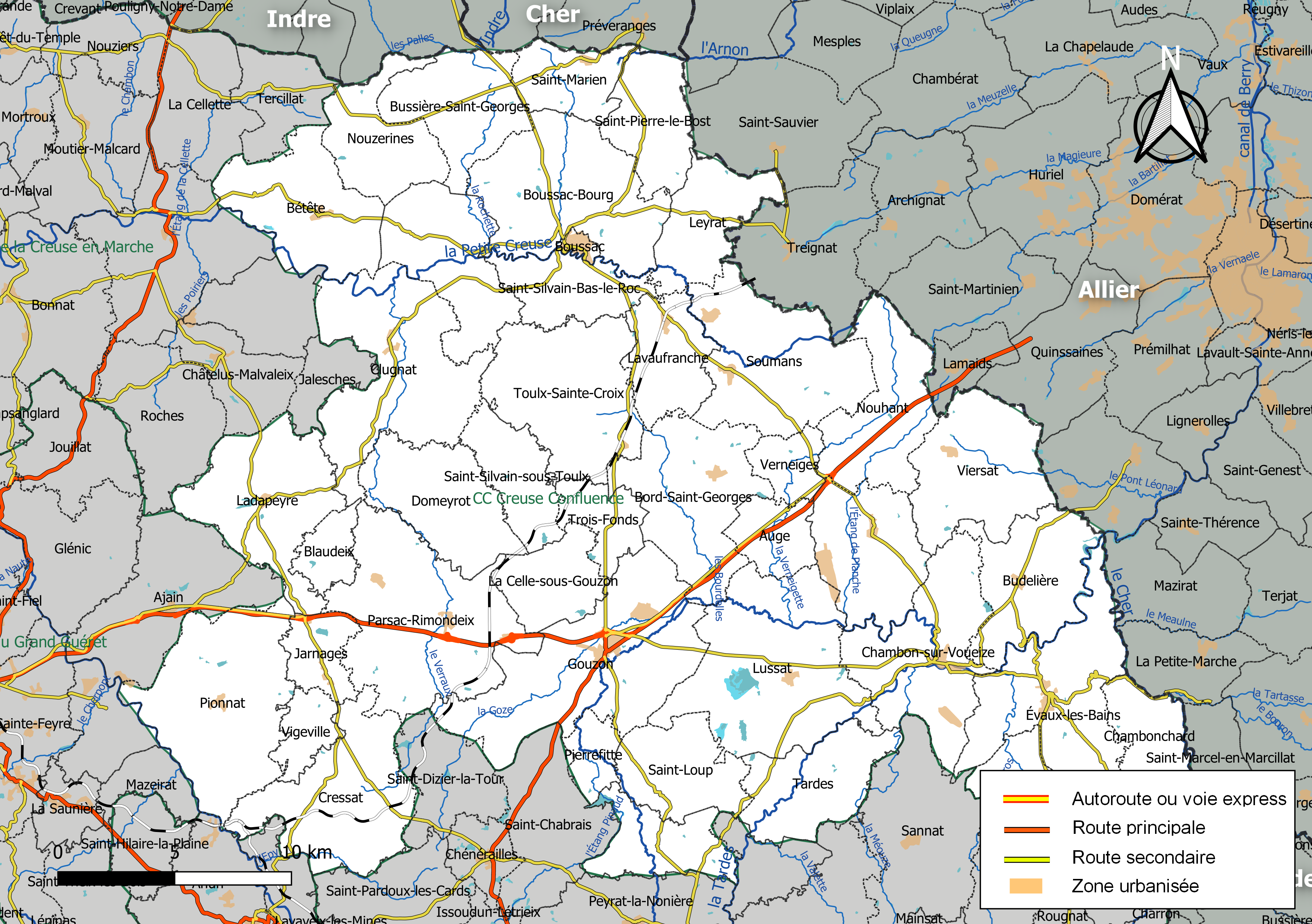 Carte géographique de l'intercommunalité Creuse Confluence, département de la Creuse, France. Composition au 1er janvier 2019.